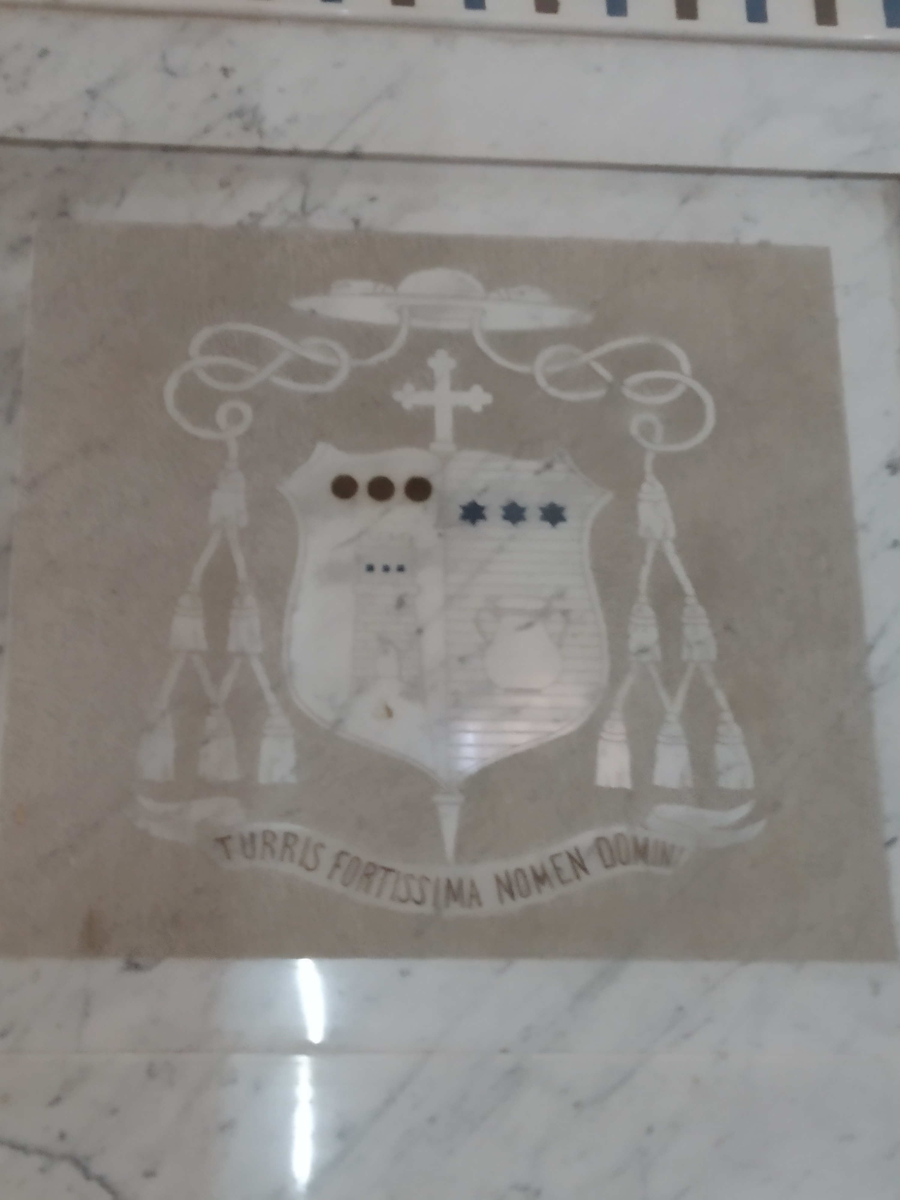 Stemma episcopale di mons. Giuseppe Paderi Concas, vescovo dell'Ogliastra, inciso nel pulpito della chiesa parrocchiale di san Giorgio martire in Villaputzu (SU)